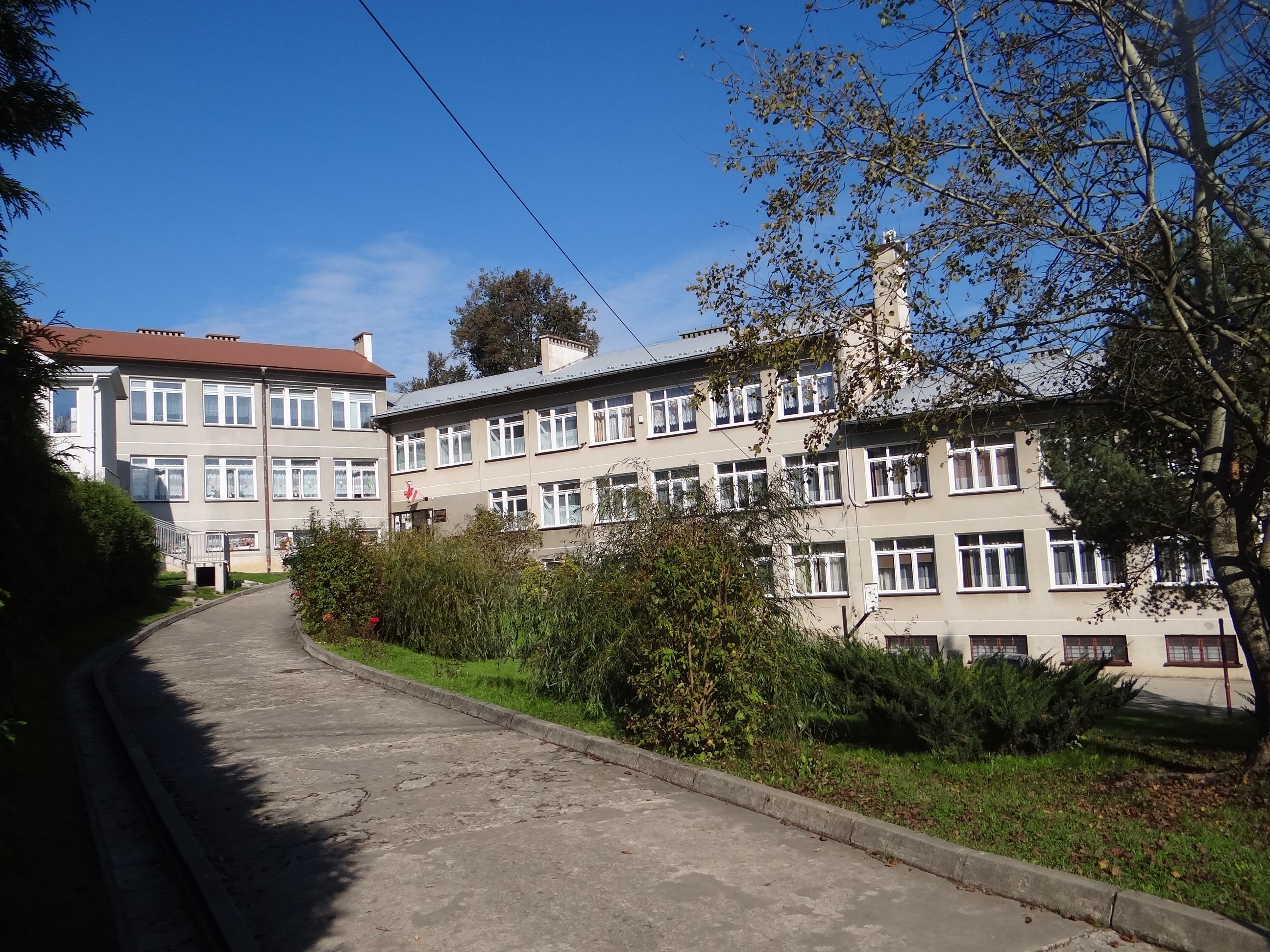 Szkoła podstawowa w Zręczycach